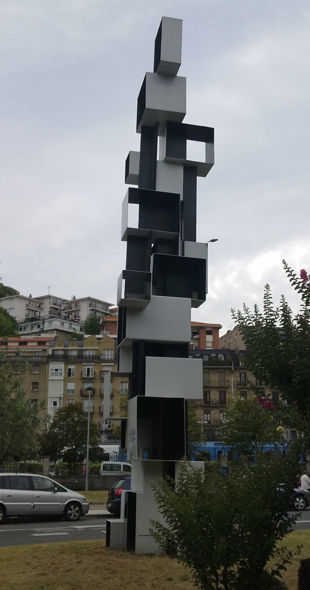 Escultura de Ricardo Ugarte en San Sebastián (País Vasco).